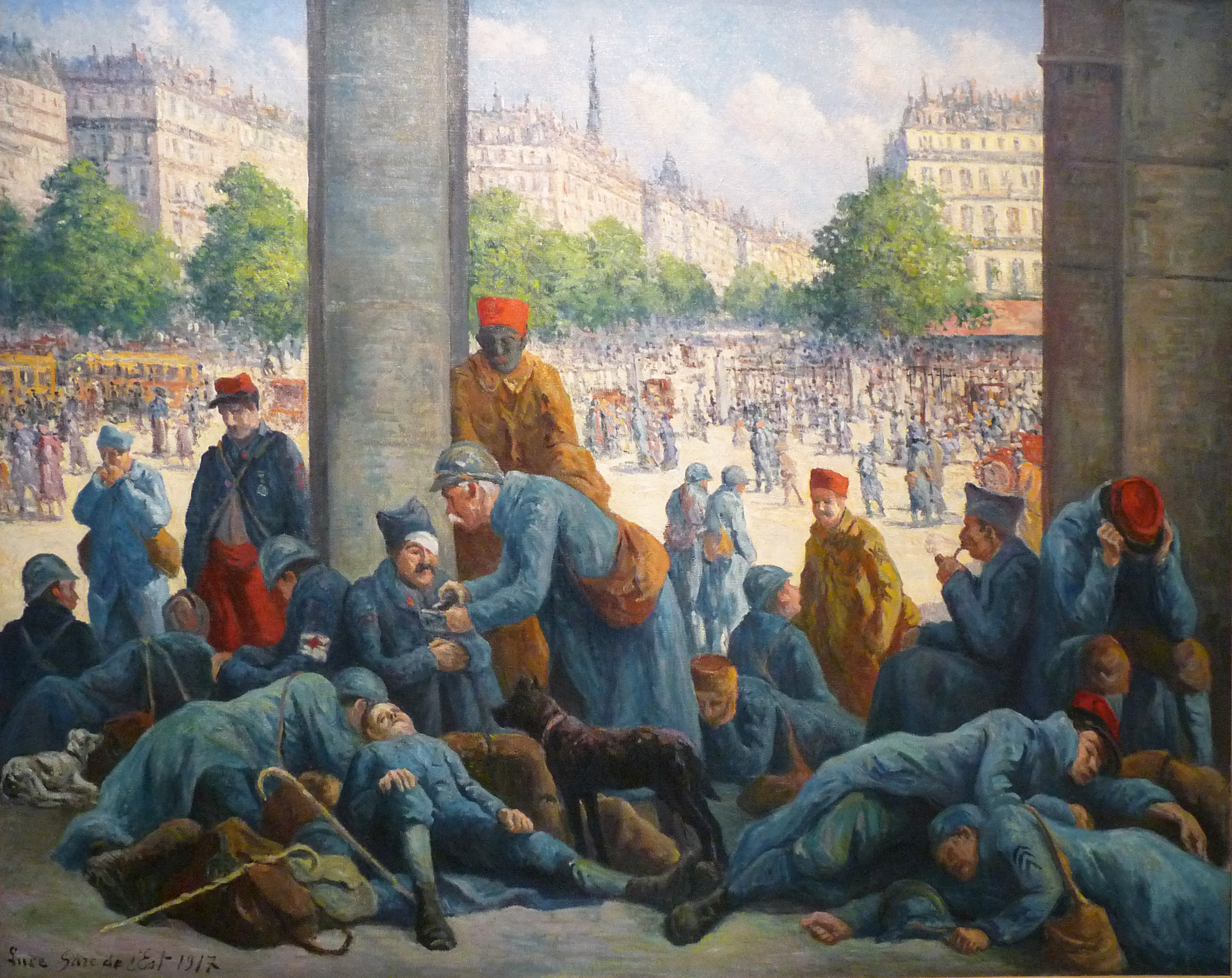 Maximilien Luce, La Gare de l'Est, 1917. Musée de l'Armée, Paris (exposition 1917 au Centre Pompidou-Metz)